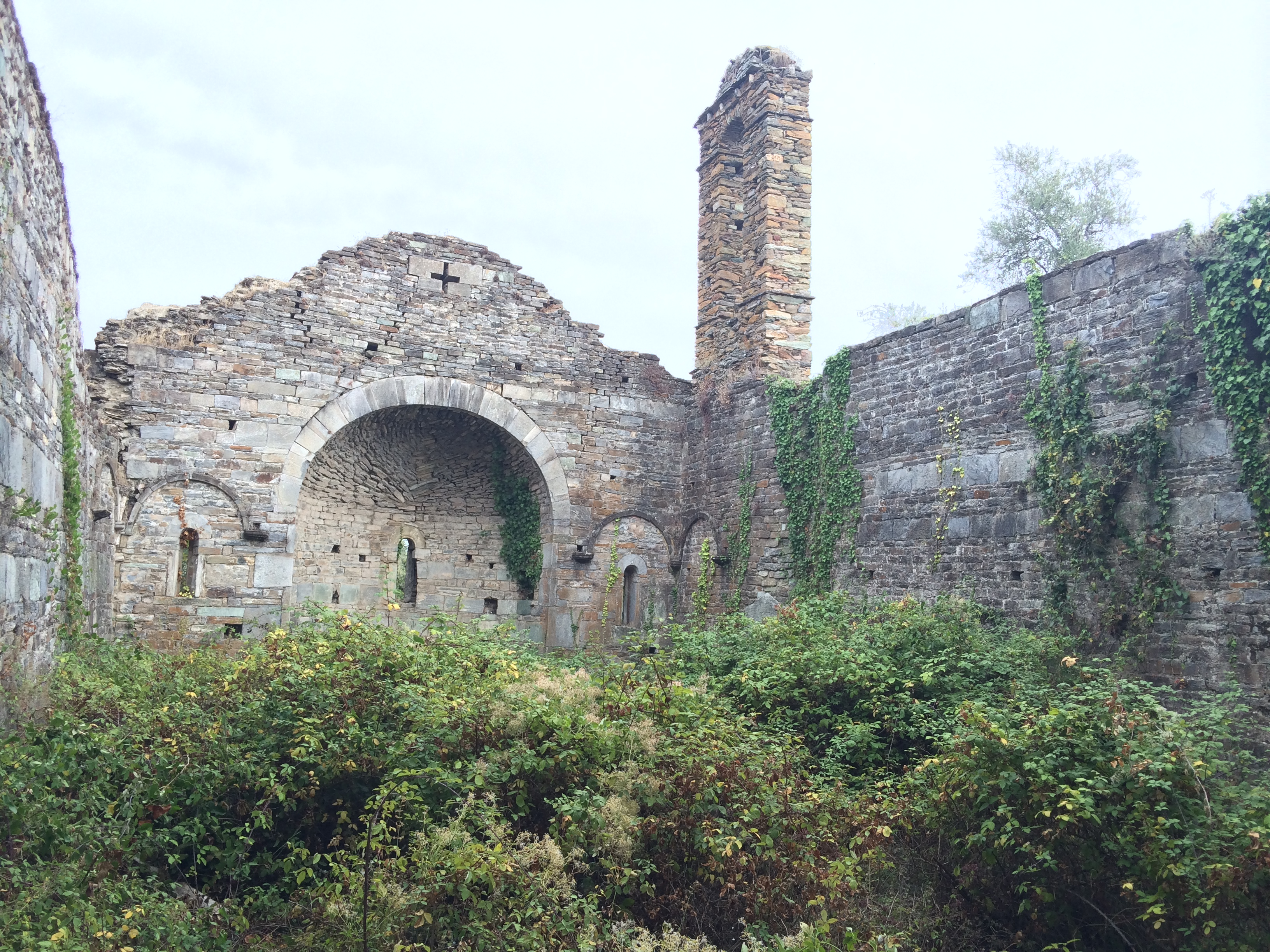 Corsu: E ruvine di a chjesa pievana di Santa Maria, à A Casalta, Ampugnani, Corsica